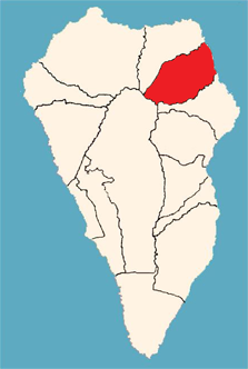 Ubicación del municipio de San Andrés y Sauces